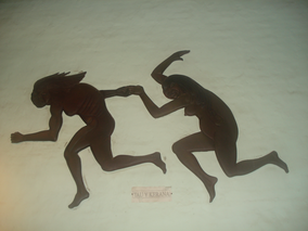 Taú y Keraná. Mitos guaraníes